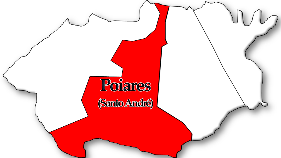 População